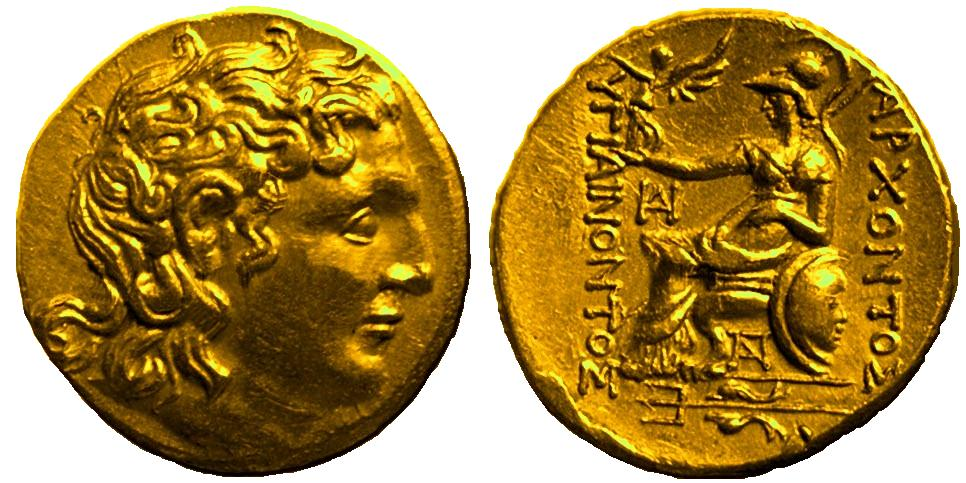 Золотая монета архонта Гигиенонта I.